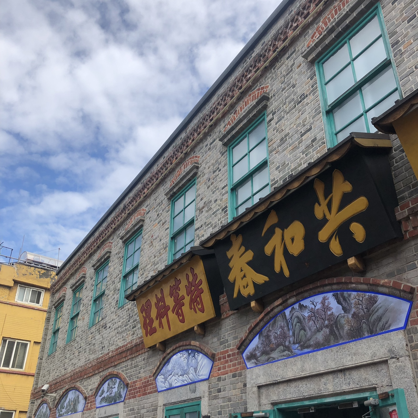 인천 차이나타운에 있는 짜장면 박물관 외부